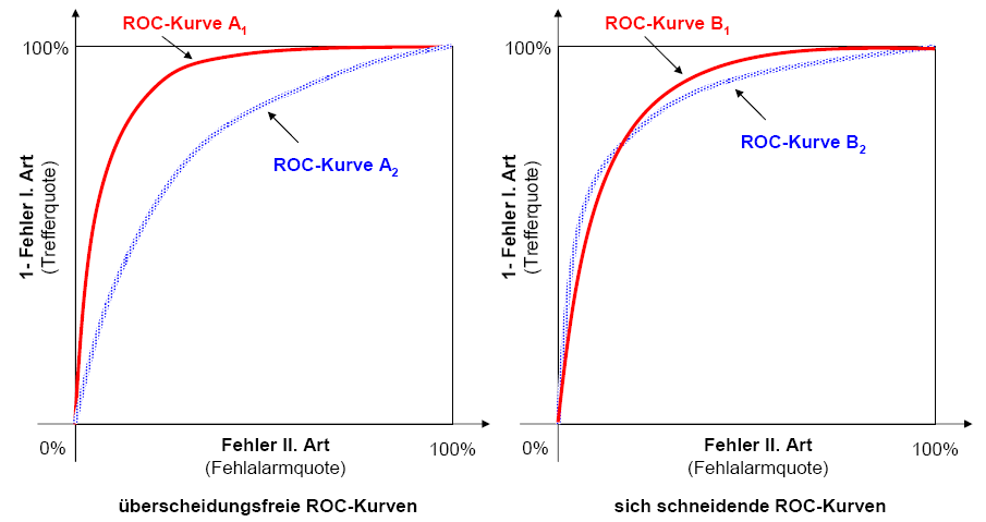 überschneidungsfreie und sich schneidende ROC-Kurven Quelle: BEMMANN (2005, S. 19)